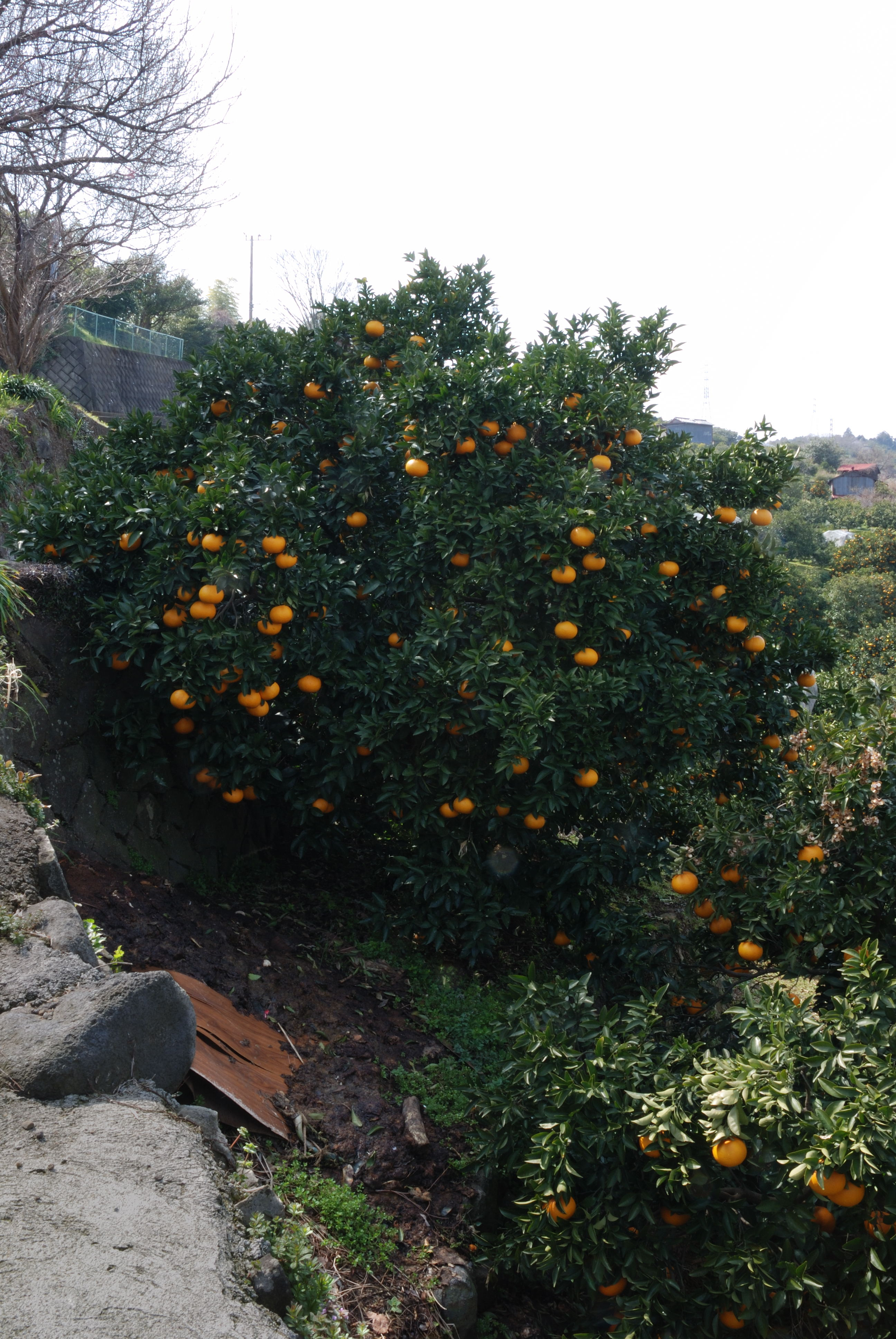 Kawanonatsudaidai(Amanatsu)